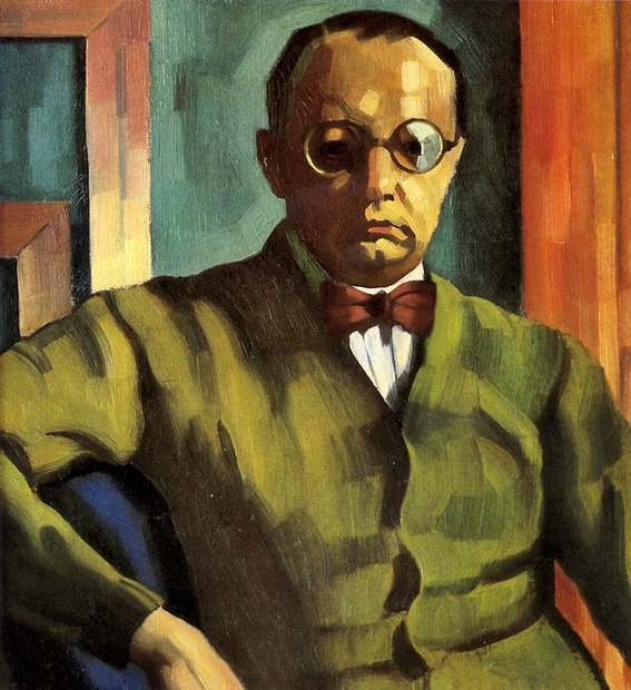 Adolf Erbslöh (1881-1947), deutscher Maler, Mitinitiator und -begründer der Neuen Künstlervereinigung München (N.K.V.M.): Selbstbildnis